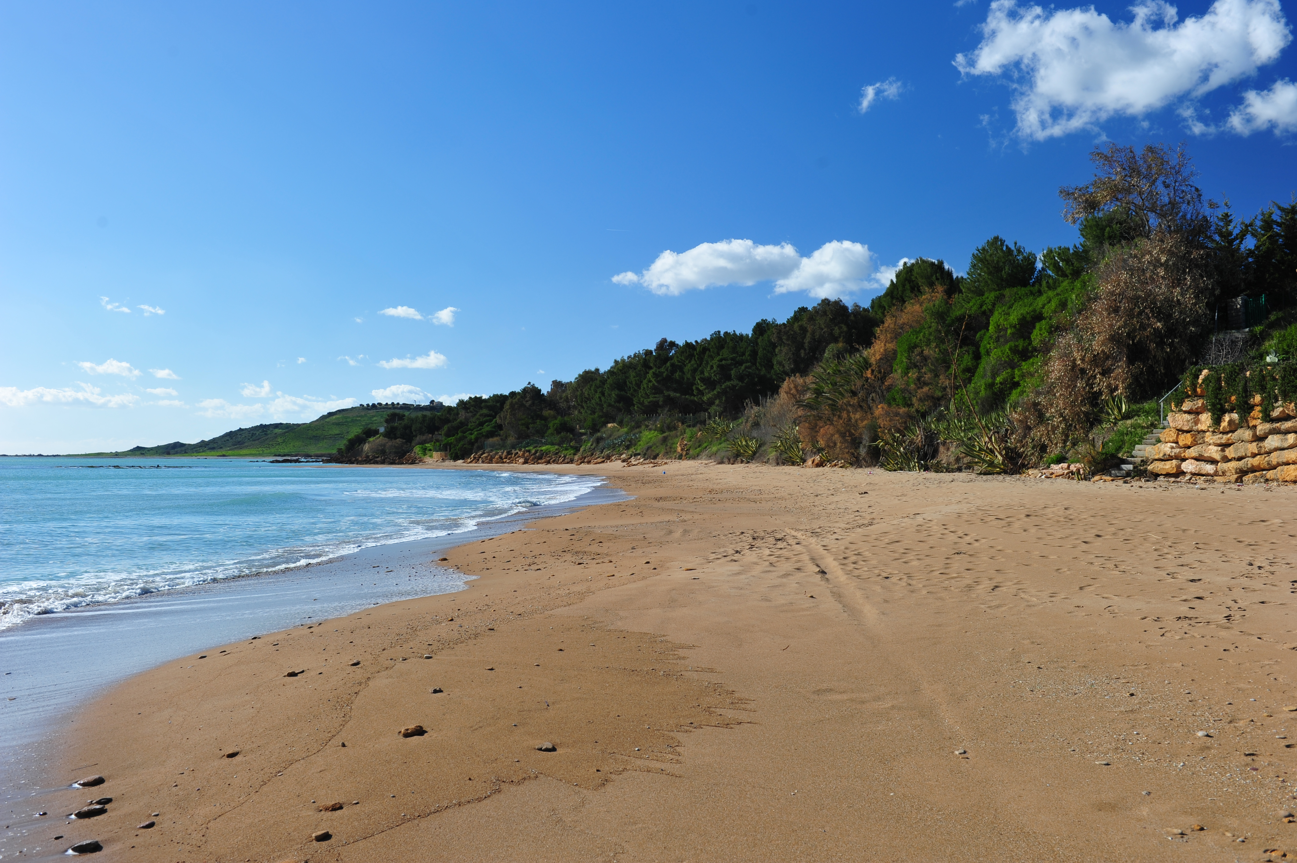 296Sciacca (Ag) spiaggia di Timpi russi- Sicily